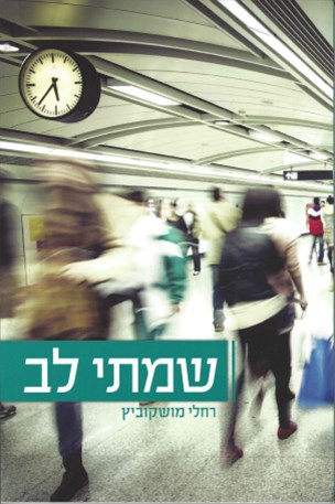 "שמתי לב", ספר ביכוריה של רחלי מושקוביץ